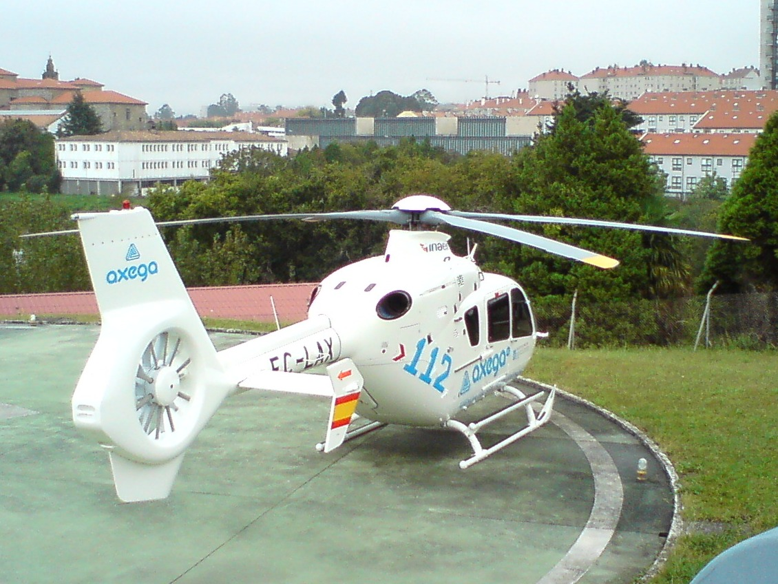 Eurocopter EC 135 de Inaer usado como helicótpero de emergencias por la Axencia Galega de Emerxencias (Axega).